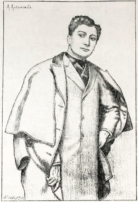 "Portrait de M. Henry Krauss."